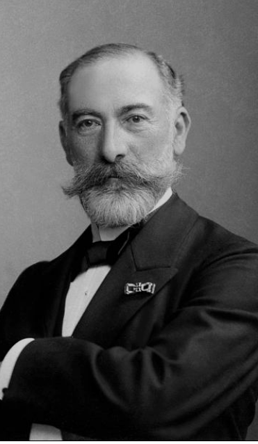 Julius Hirschwald, c. 1900. Photographie von J. C. Schaarwächter